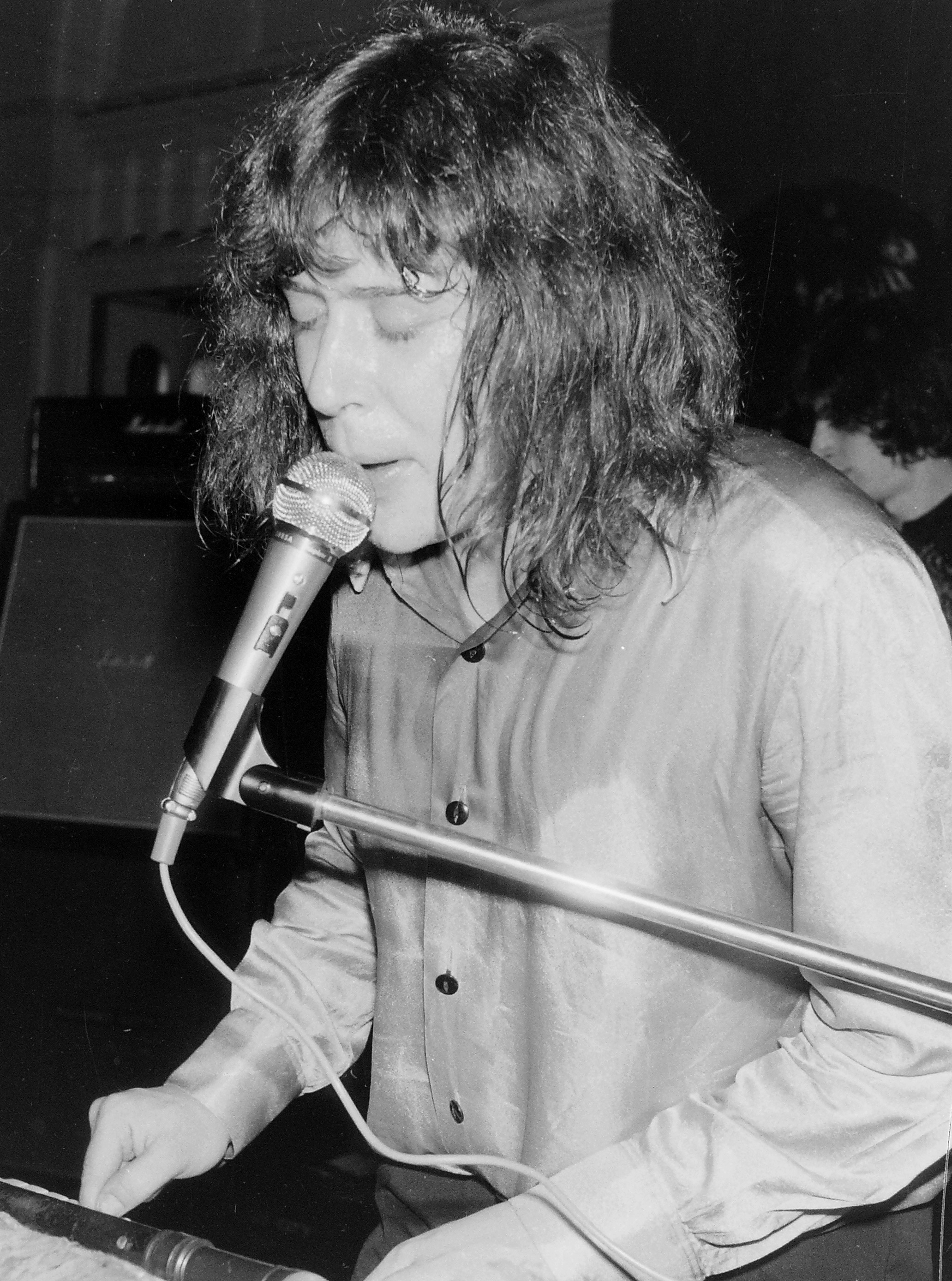 Illés Lajos (Budapest, 1942. március 18. – Budapest, 2007. január 29.) magyar zenész, zeneszerző, énekes, az Illés-együttes alapítója.